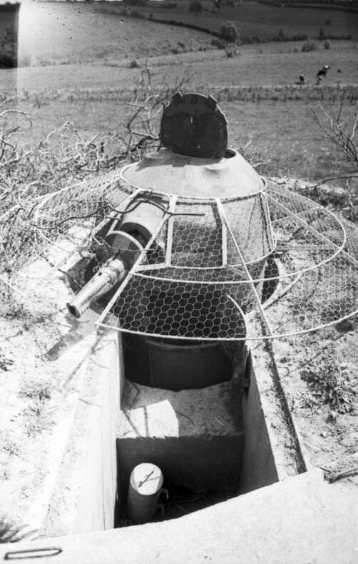 Information added by Wikimedia users.Das Foto zeigt einen "La tourelle démontable STG modèles 1935/1937 pour mitrailleuse 8 mm"